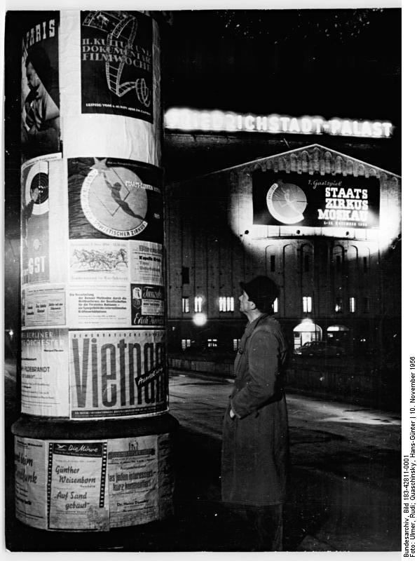 Berlin, Friedrichstadt-Palast, Litfaßsäule, Nacht Zentralbild Ulmer-Quaschinsky. Wjk-Qu 10.11.1956 Zum Gastspiel des Moskauer Staatszirkus in Berlin Nachtaufnahme vor dem Berliner Friedrichstadt-Palast-Varités, in welchem das Gastpiel stattfindet.